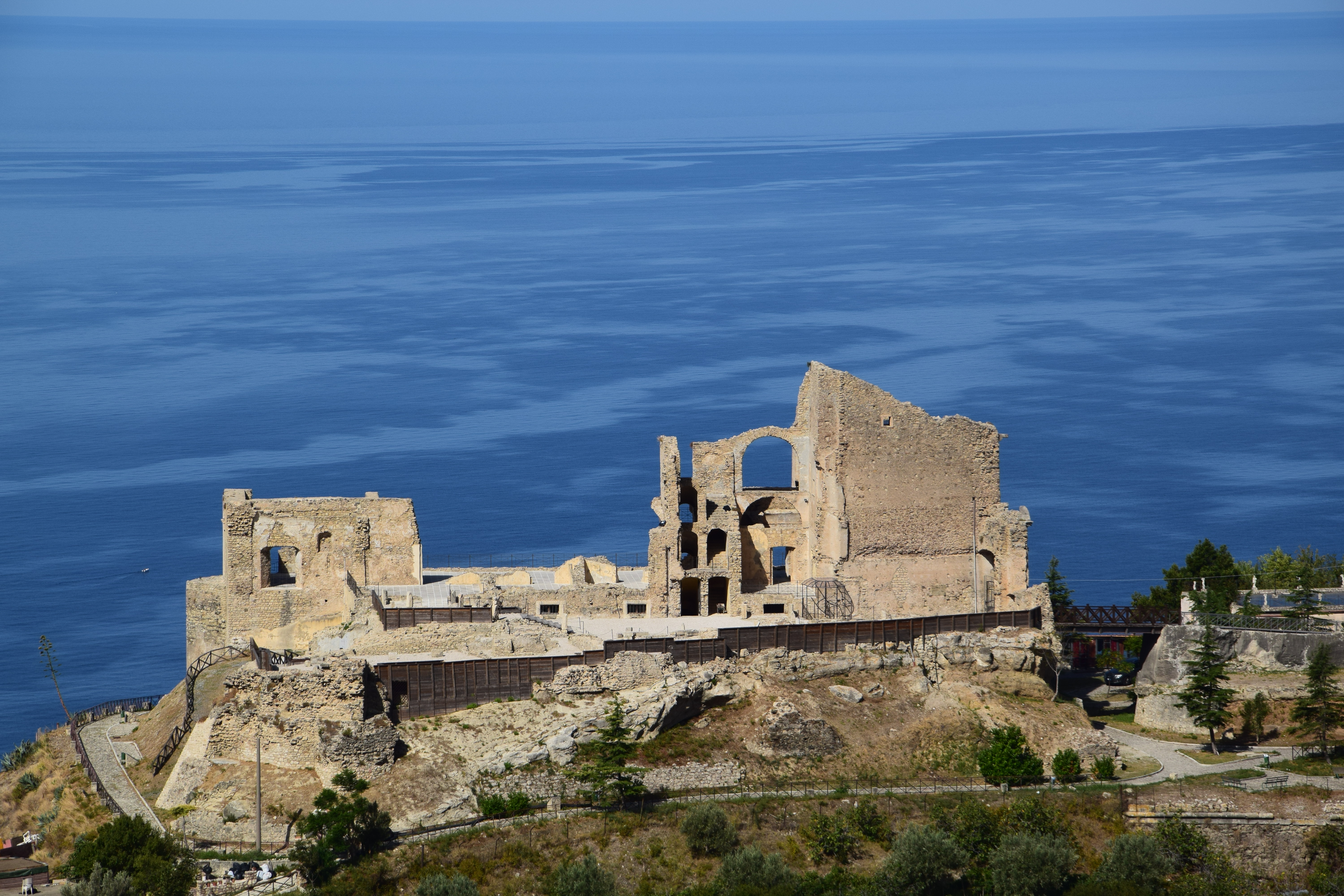 Nei primi anni del 1800, il Castello fu semidistrutto dai francesi, rappresentati da Giuseppe Napoleone This is a photo of a monument which is part of cultural heritage of Italy.